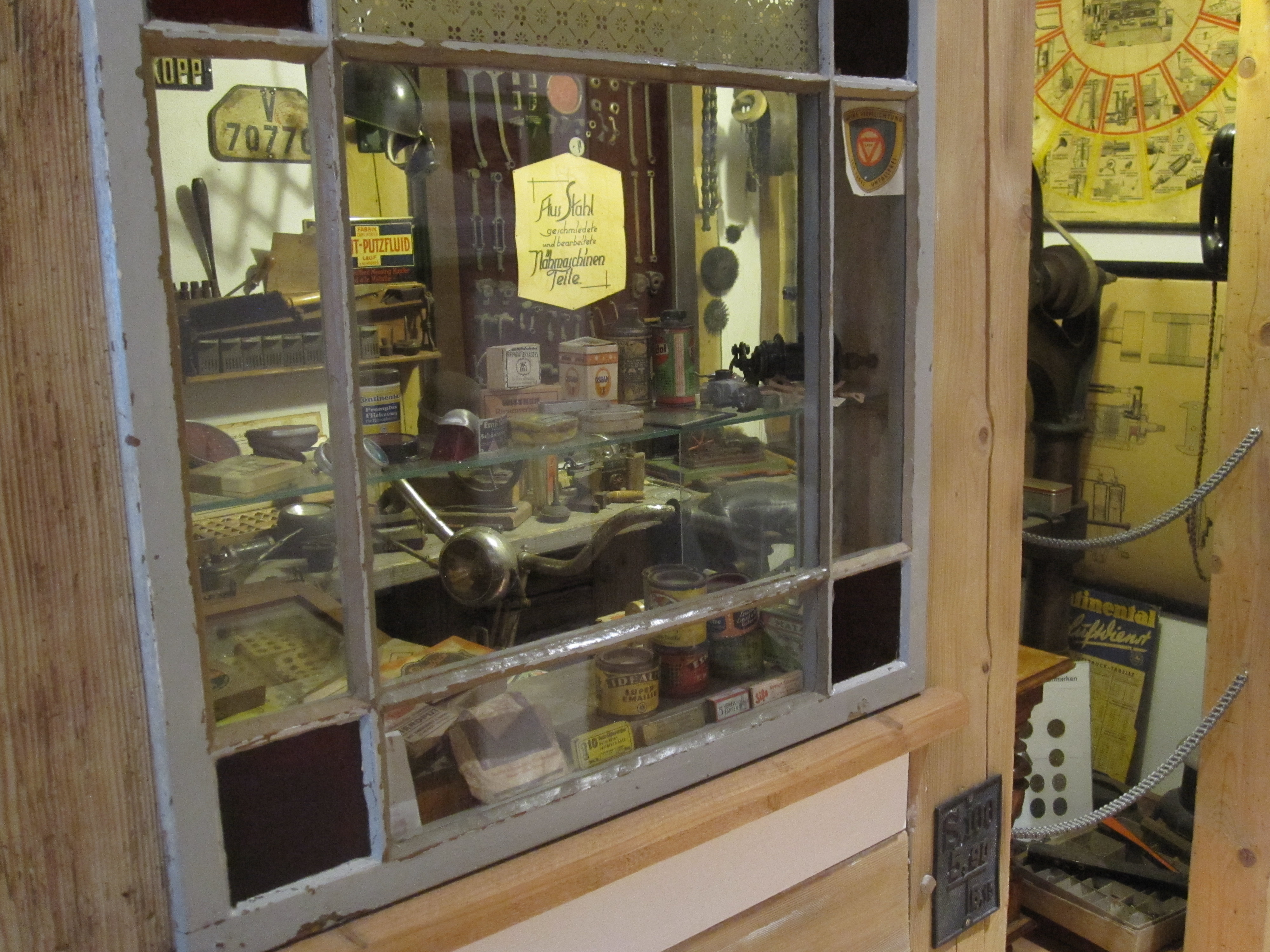 Bürsten- und Heimatmuseum Schönheide: Vor dem Raum mit der Werkstatt des Nähmaschinen- und Fahrradmechanikers Emil Oschatz steht ein Fahrrad mit Hilfsmotor aus den 1930er Jahren, dessen Zweitaktmotor vor dem Lenker angebaut war und seine Kraft mit einem Reibrad auf das Vorderrad übertrug . Solche Fahrräder hießen im Volksmund Hühnerschreck. Die Werkstatt versammelt alle Gerätschaften und Vorräte, wie sie ein Mechaniker dieser Fachrichtung braucht – auf dem Stand von vor etwa 1950. Die Werbemittel und Produkte in der Werkstatt und ihrem Schaufenster sind weitgehend aus der Zeit von vor 1945. Emil Oschatz hatte seine Werkstatt in Schönheide etwa von 1935 bis 1970. Er reparierte neben Nähmaschinen und Fahrrädern auch motorgetriebene Zweiräder – Motorräder und Besonderheiten wie den „Hühnerschreck“.